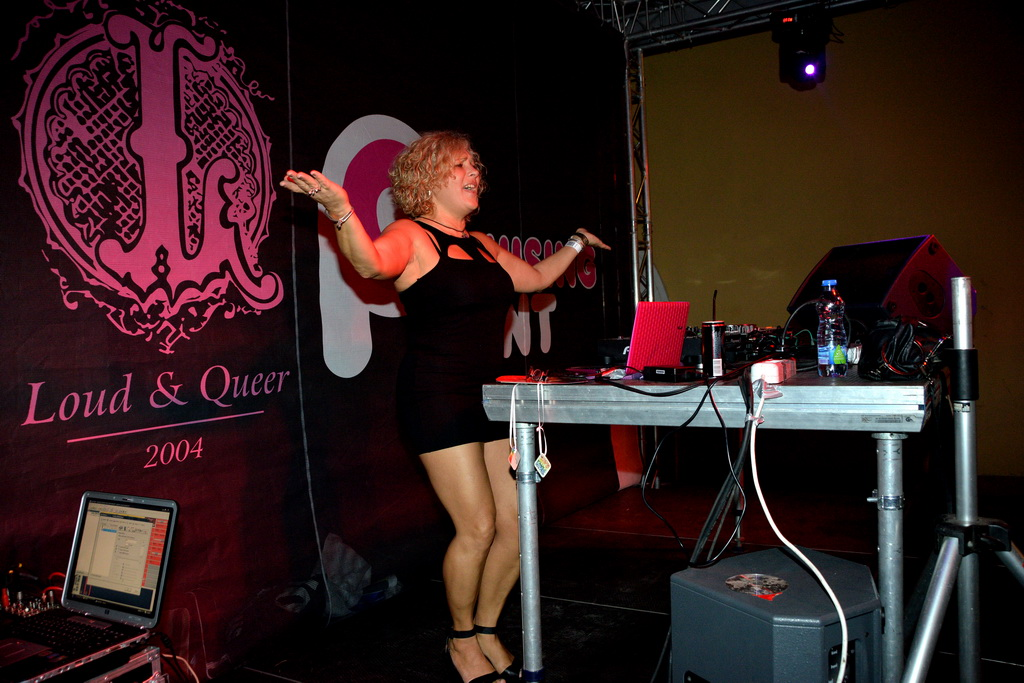 Marina Perazić na festivalu Egzit 2012.